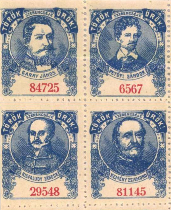 A Török Bankház által szervezett osztálysorsjáték szelvényei